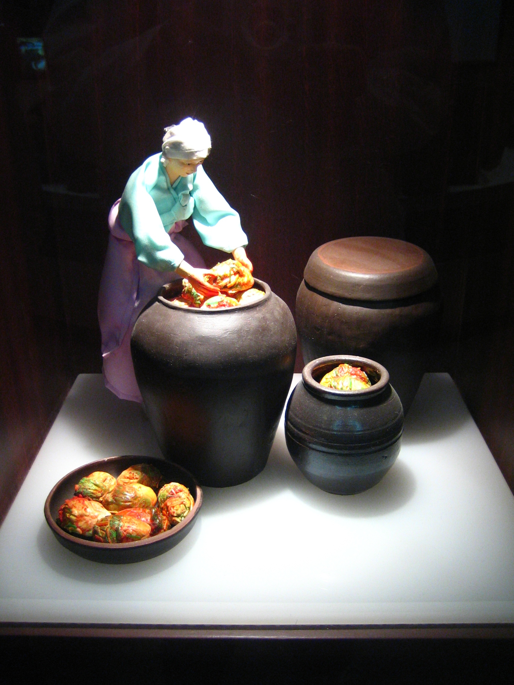 Kimchi Field Museum in Seoul, Korea